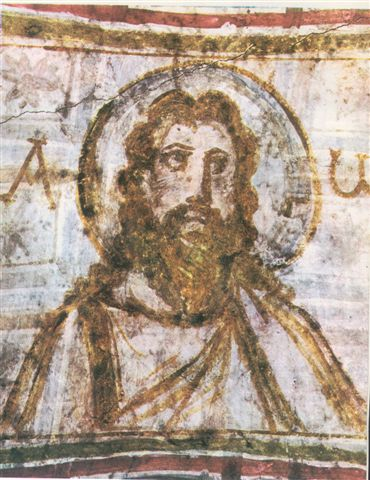 Иисус Христосфрагмент росписей римских катакомб